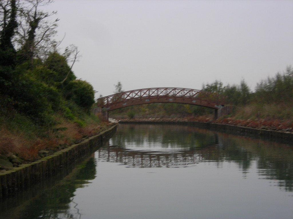 Isola di Poveglia, canale interno